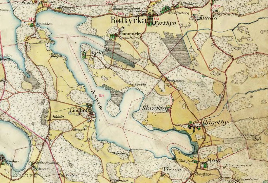 Hågelby Lindhov Aspen: Häradsekonomiska karta 1901